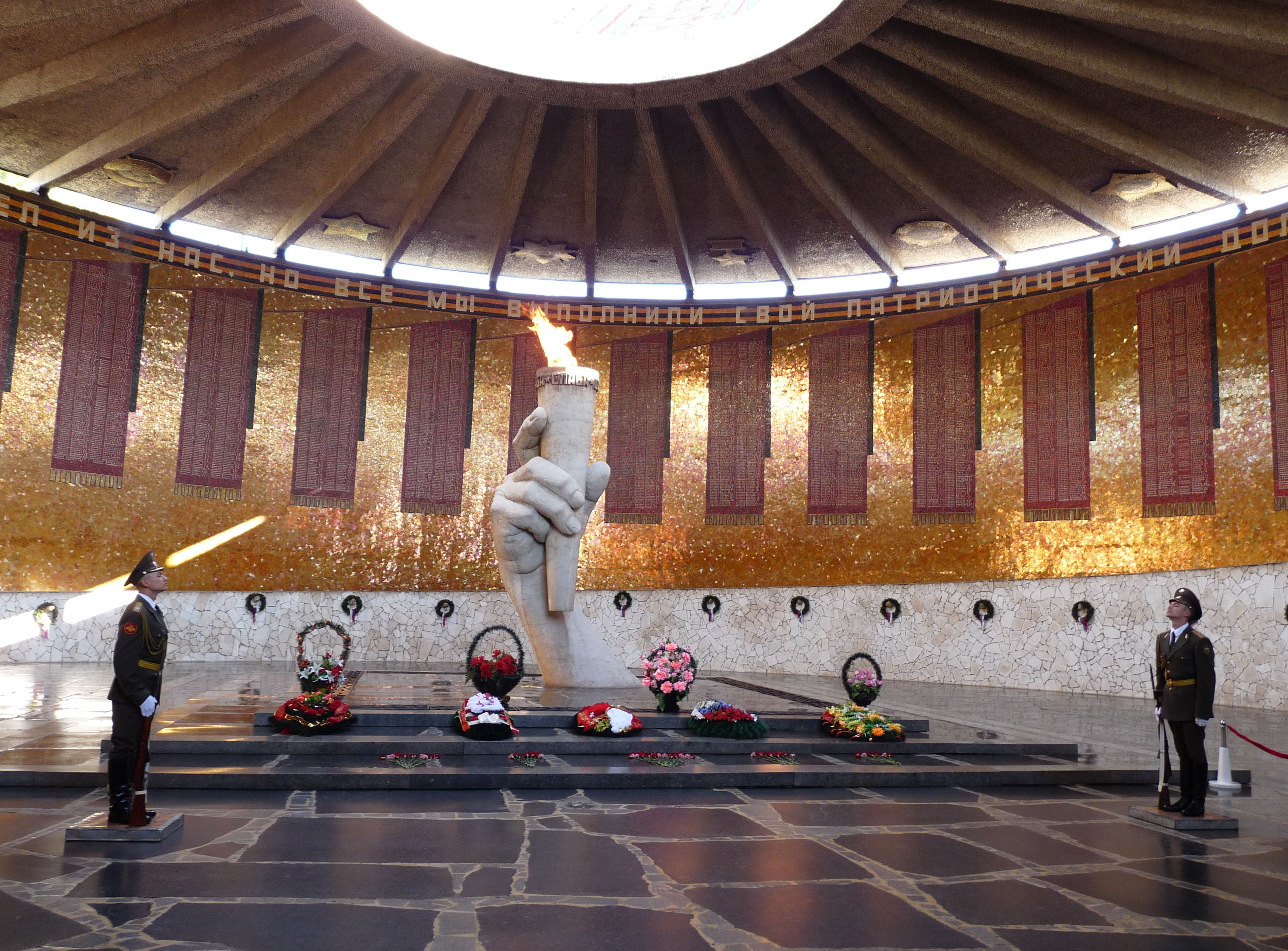 Volgograd, Hall of Heroes 01